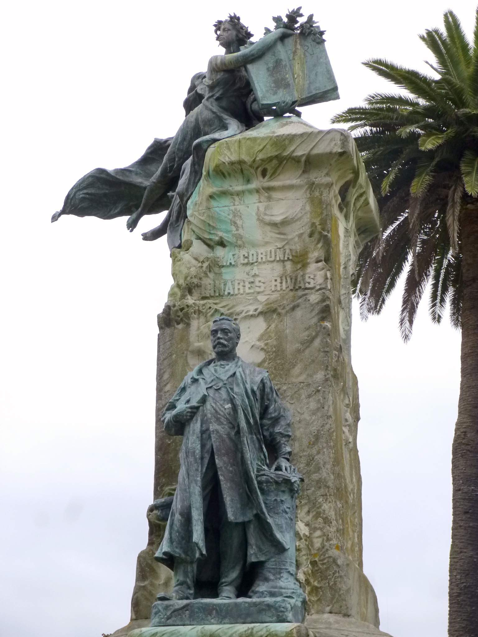 A Coruña - Jardín de Méndez Núñez - Monumento a Aureliano Linares Rivas